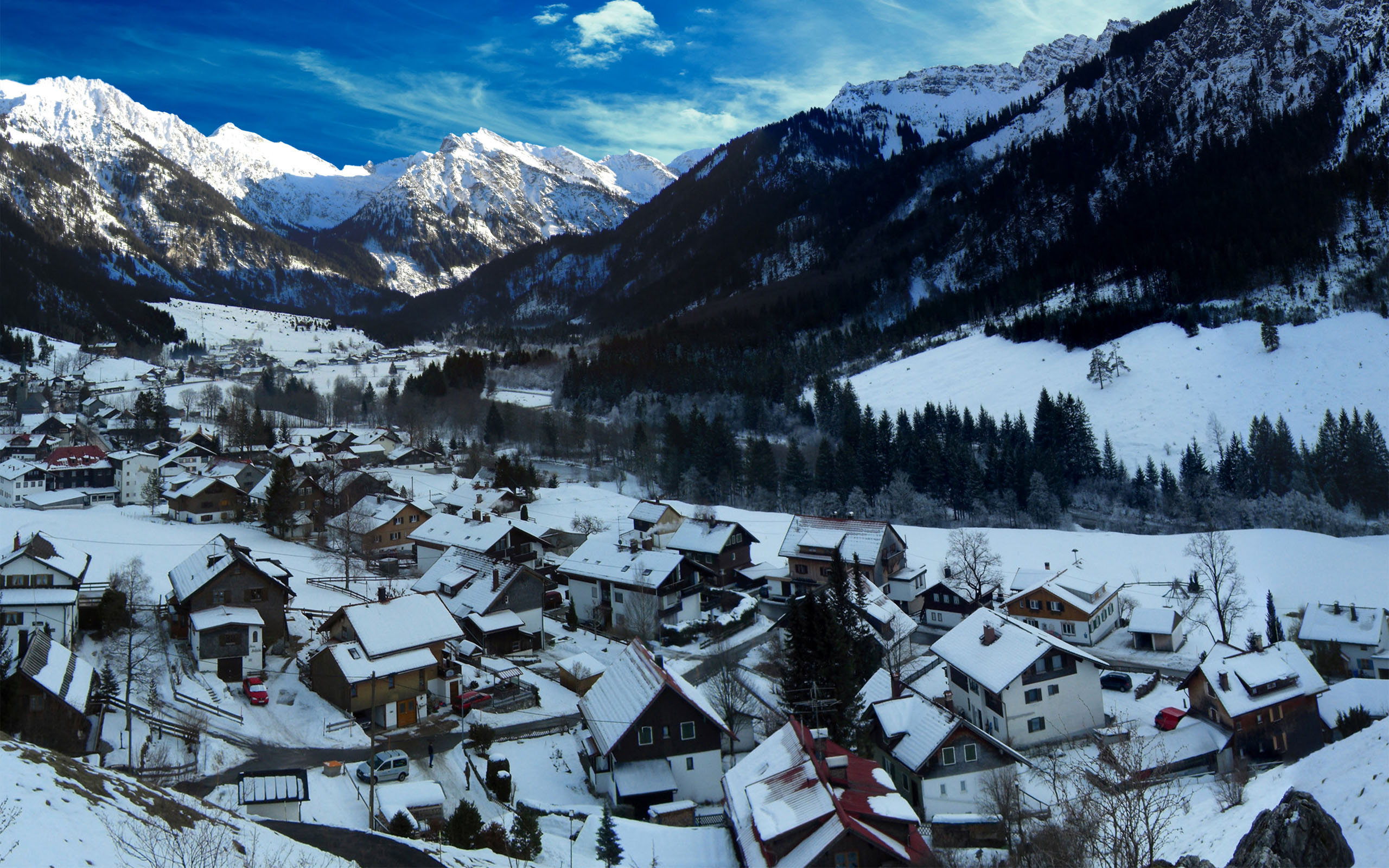 Hinterstein mit Blick nach Südosten durch das Ostrachtal auf die umgebenden Allgäuer Alpen.